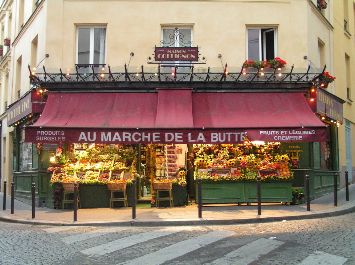 Décor du film Le Fabuleux Destin d'Amélie Poulain : l'épicerie Collignon de la rue des Trois Frères à Montmartre.